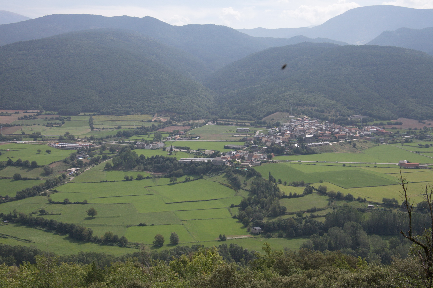 El Pla de Sant Tirs és un nucli del municipi de la Ribera d'Urgellet, a l'Alt Urgell (Catalunya)